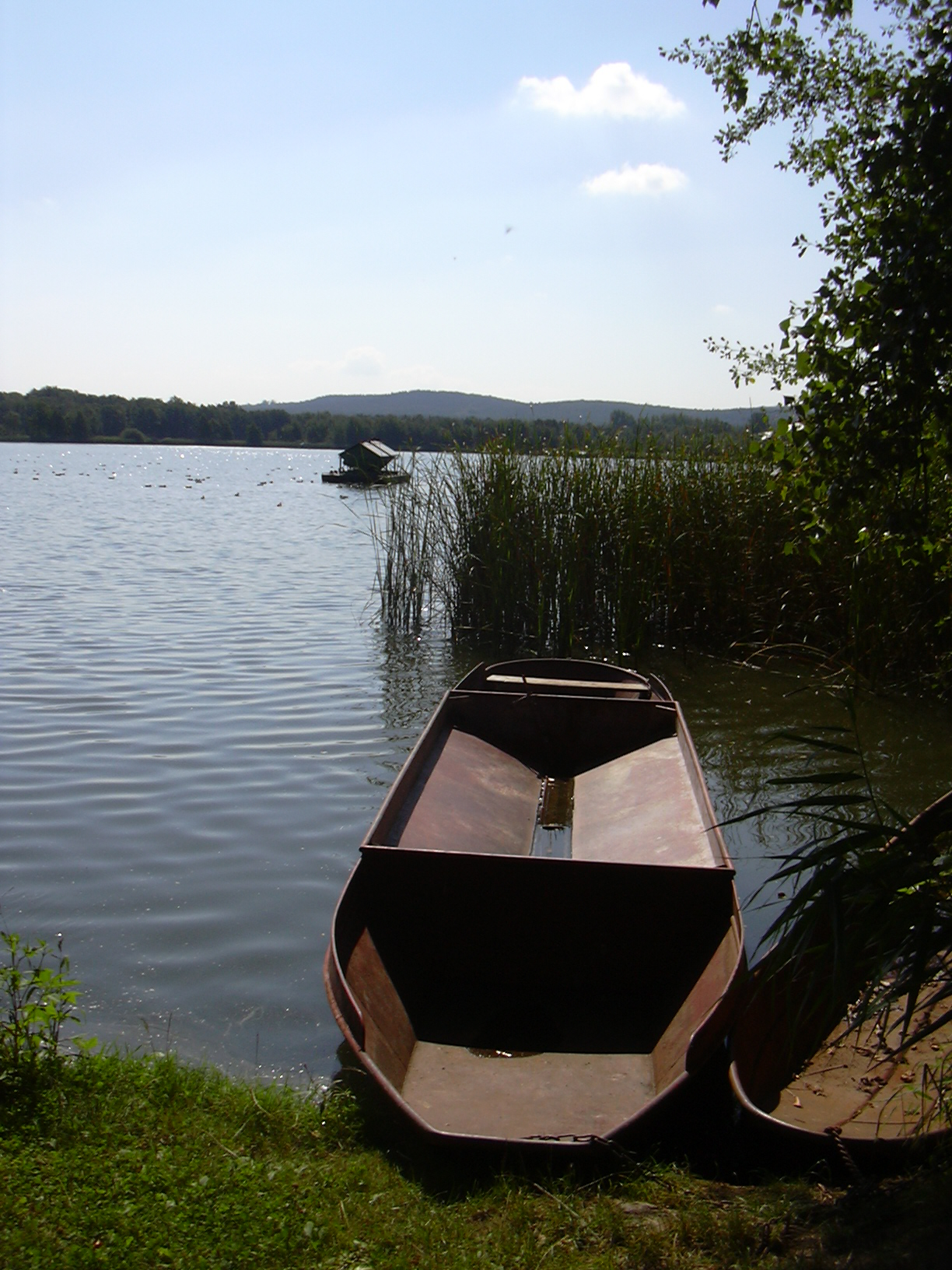 Ullersdorfer Teich